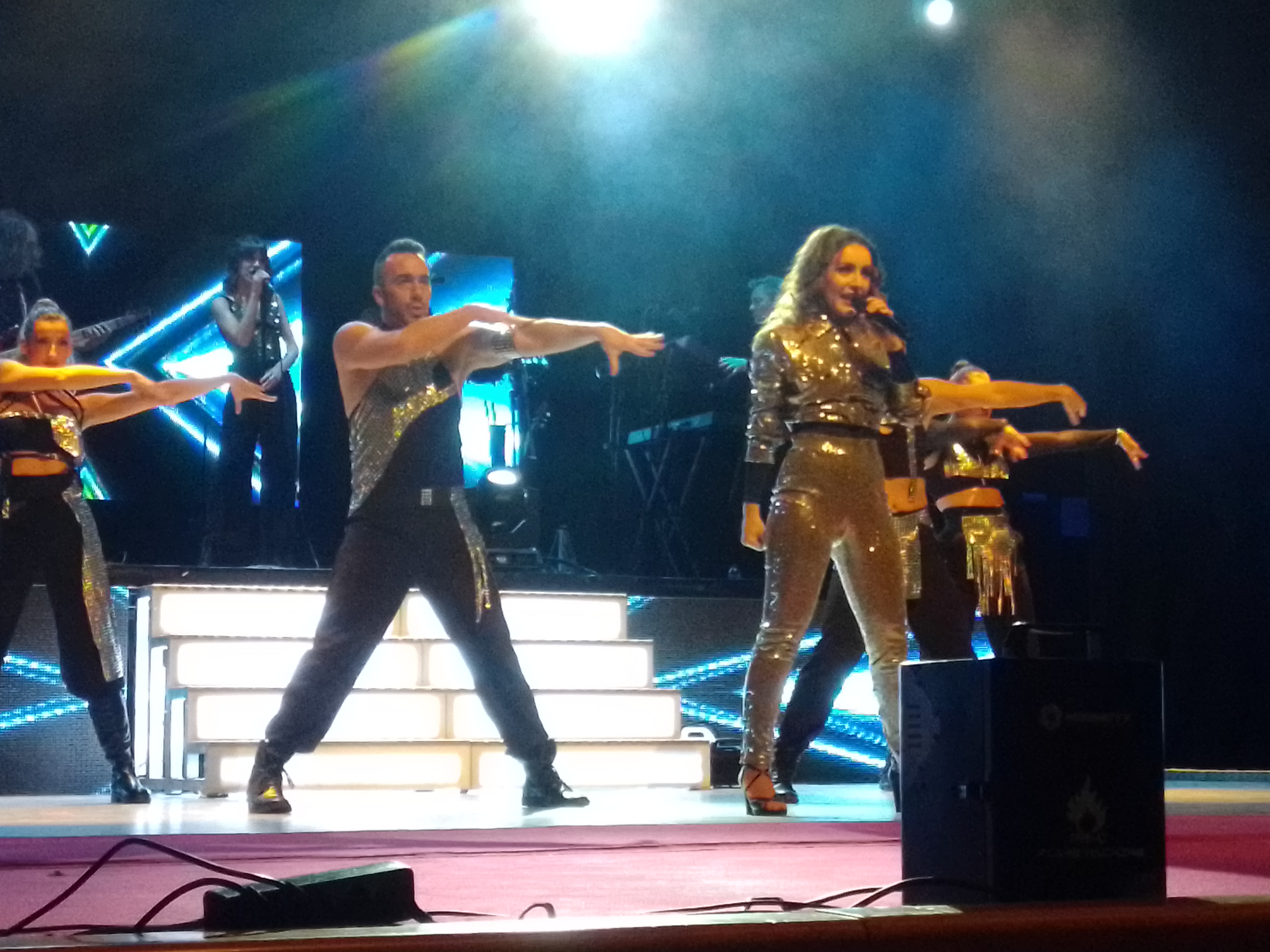 Remember tributo a Madonna. Remember, Live Tribute to Madonna es un homenaje a la indiscutible Reina del Pop. A través de 4 bloques (Años 80 / Años 90 / Años 2000 / Última era), el espectáculo hace un repaso de la carrera de la artista más exitosa de los últimos tiempos. Un espectacular elenco de bailarines y músicos acompaña a la actriz y cantante Claudia Molina, que interpretará en directo a la Ambición Rubia en un original show.